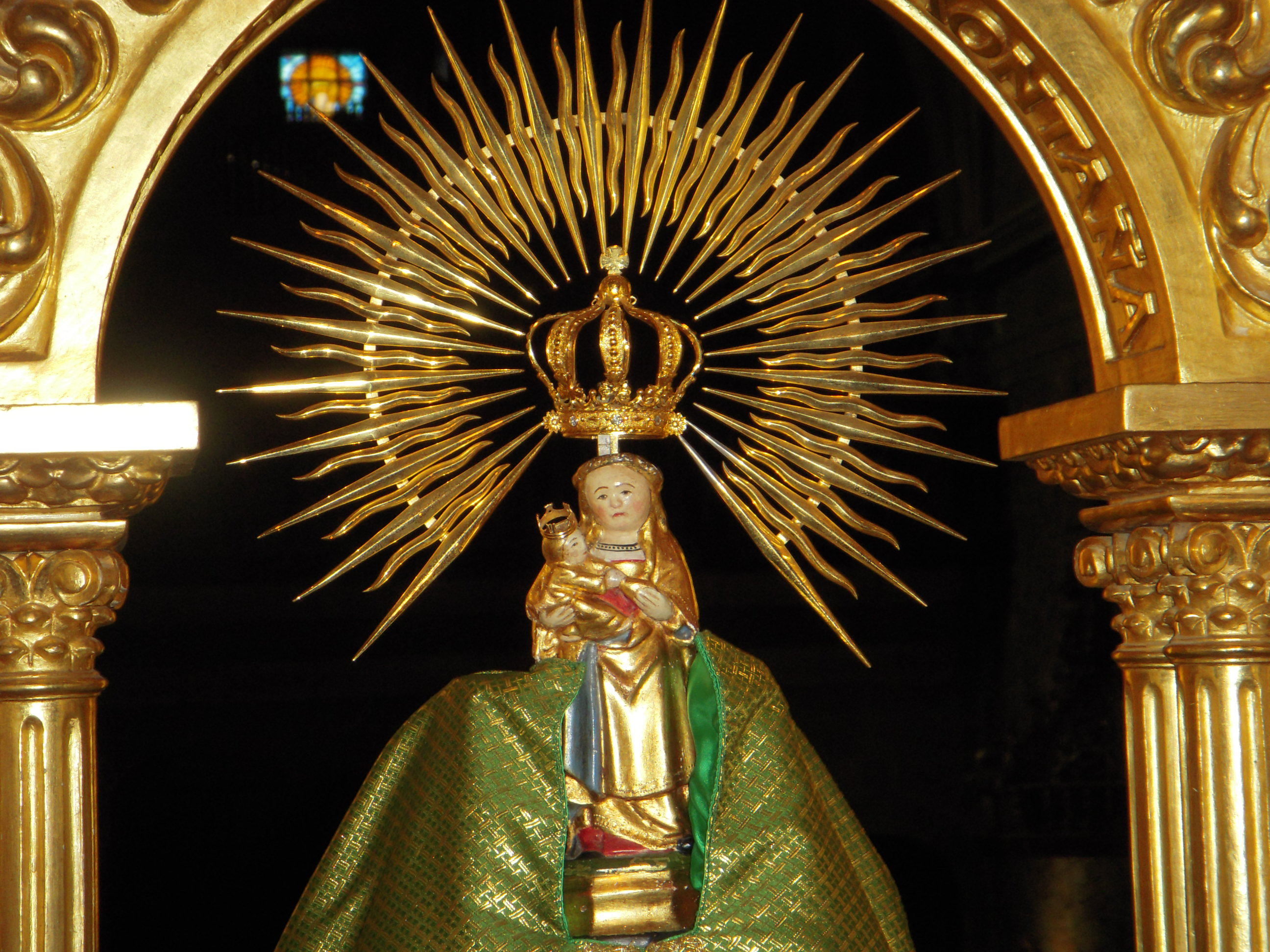 Patrona de Cantabria